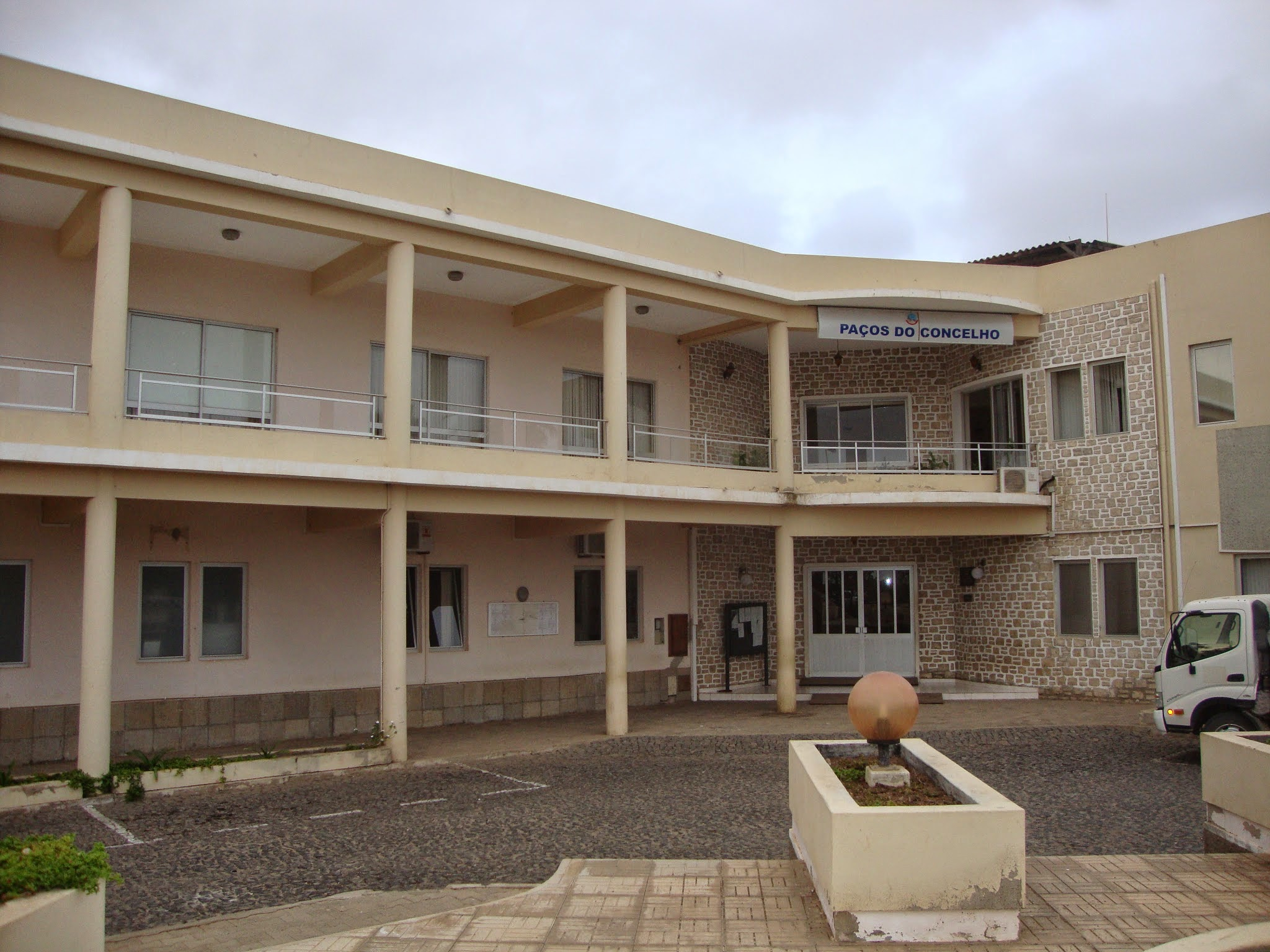 Câmara Municipal da ilha do Sal, Cabo Verde, localizada na cidade de Espargos.